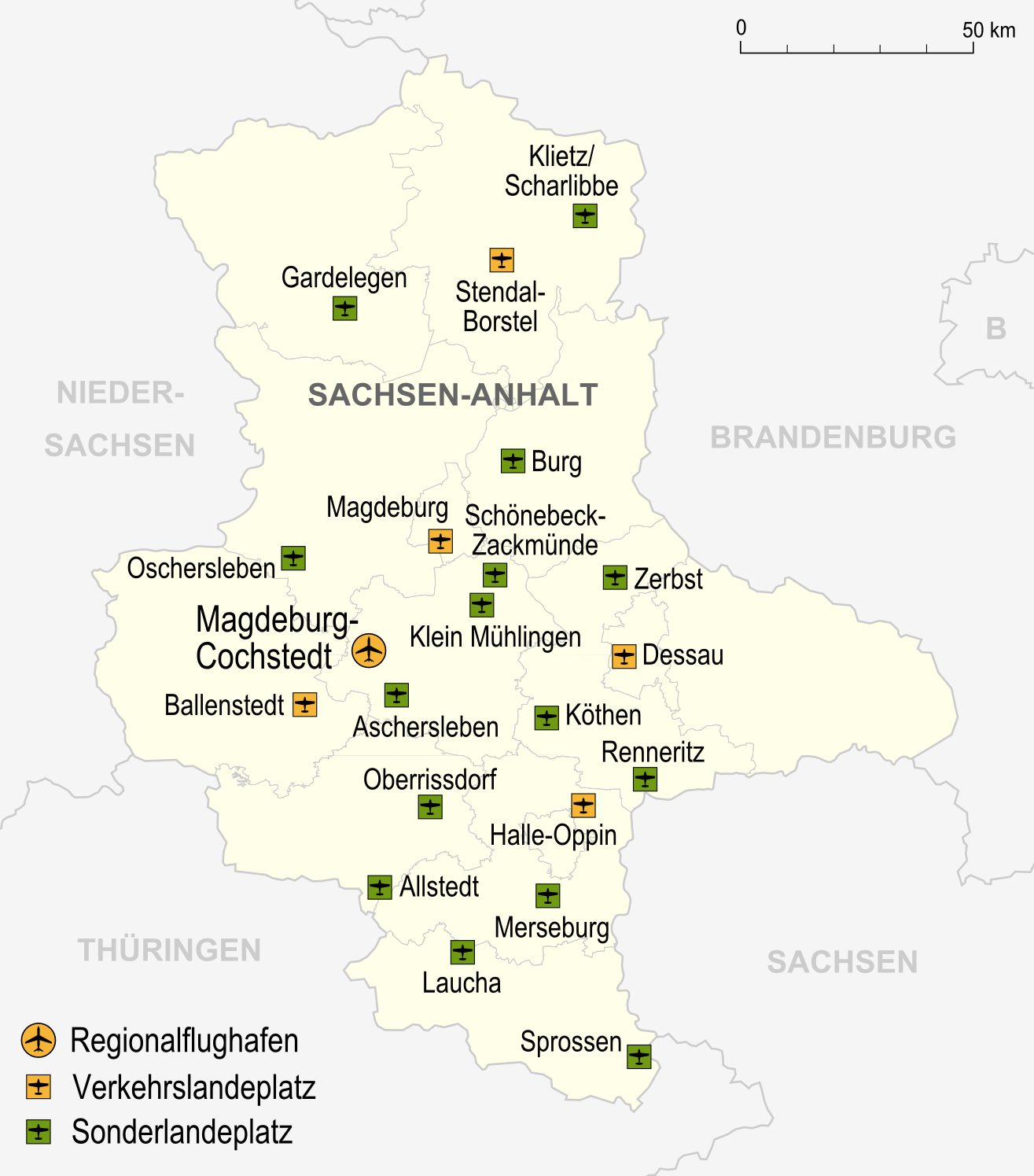 Flughäfen, Verkehrslandeplätze, Sonderlandeplätze und Wasserlandeplätze in Sachsen-Anhalt, Stand 2007